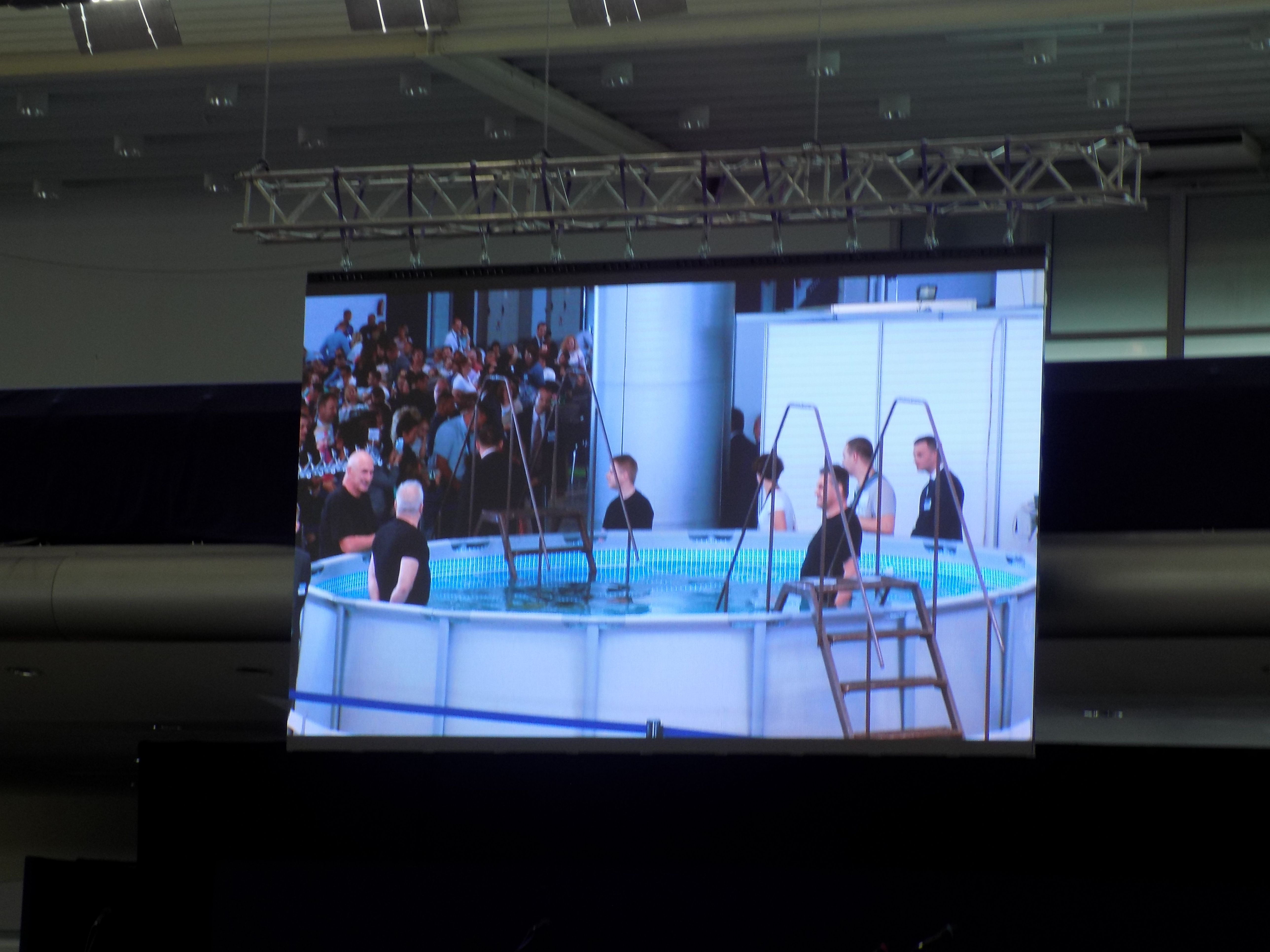 Zgromadzenie regionalne Świadków Jehowy pod hasłem: "Lojalnie trwajmy przy Jehowie" na Międzynarodowych Targach Poznańskich w 2016 roku.